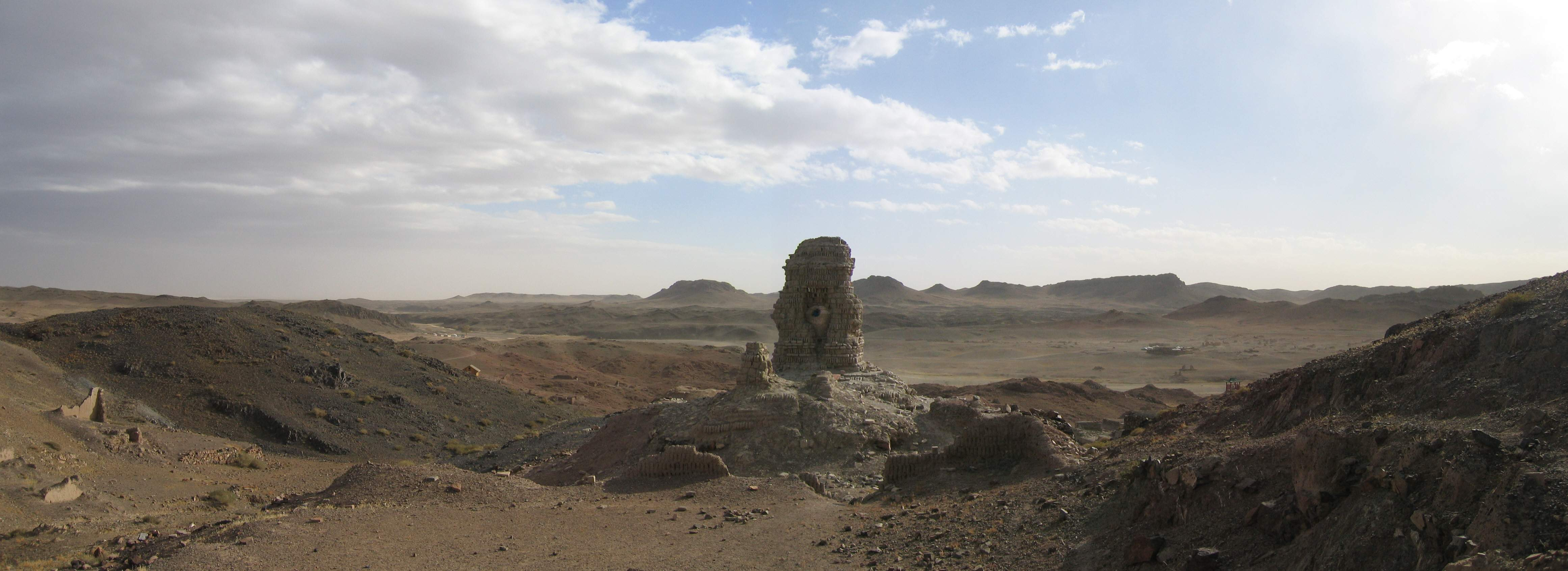 Monastère détruit d'Ongiin Khiid